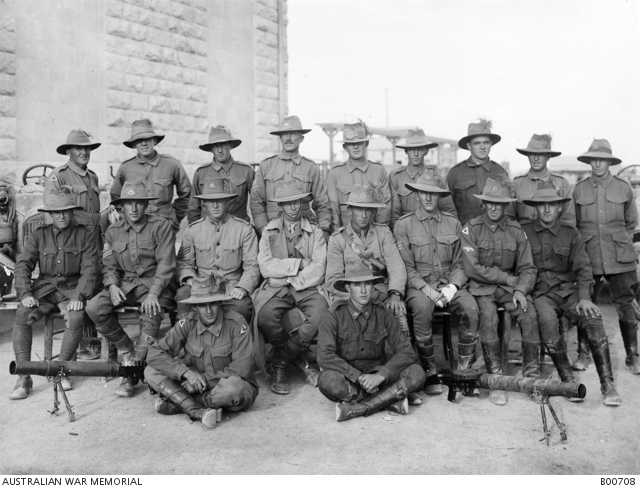 חיילים מיחידת פטרול המכוניות הקלות מס. 1 השייכת לדיביזיית הפרשים ה-5 בחלב